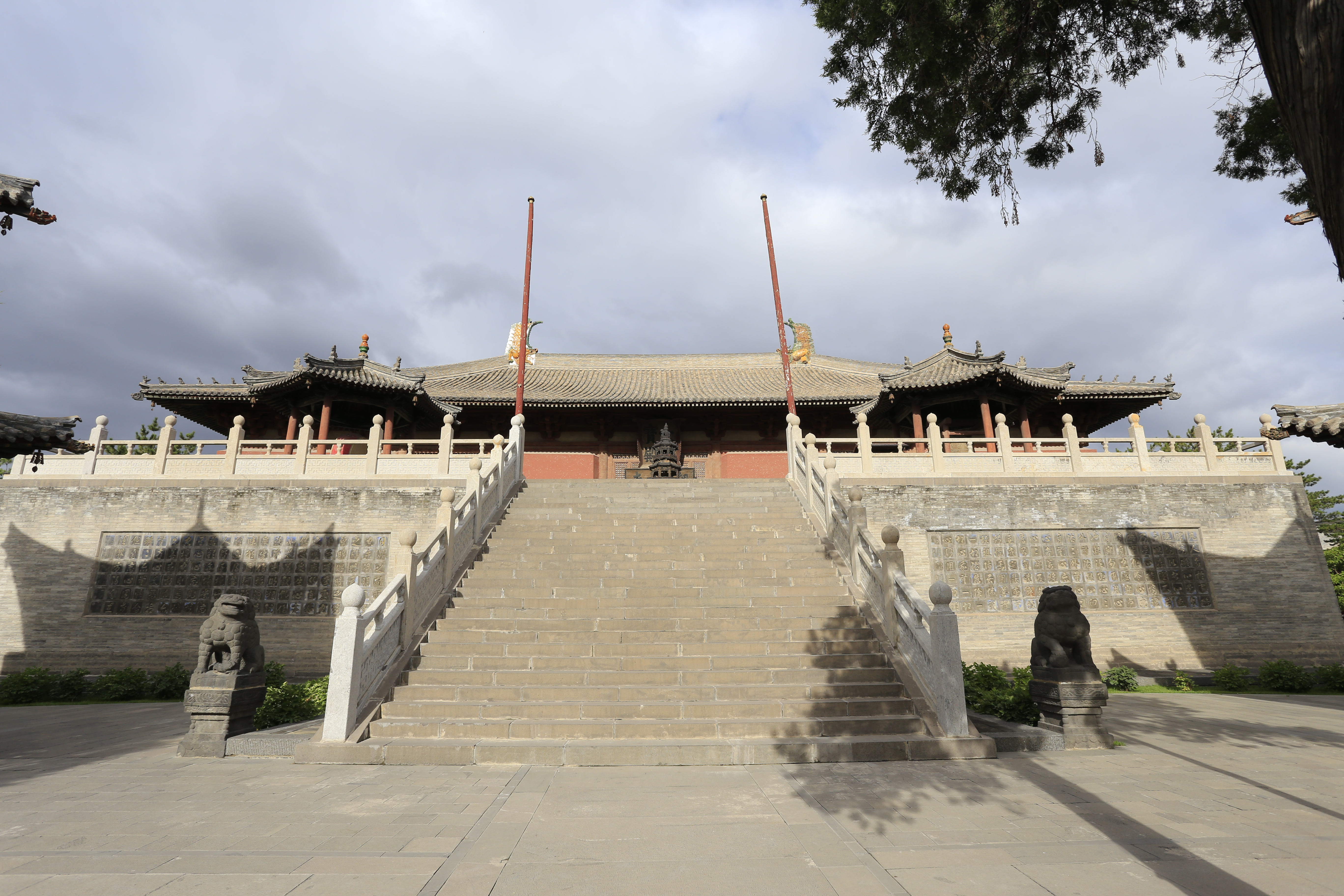 大同华严寺—— 大雄宝殿